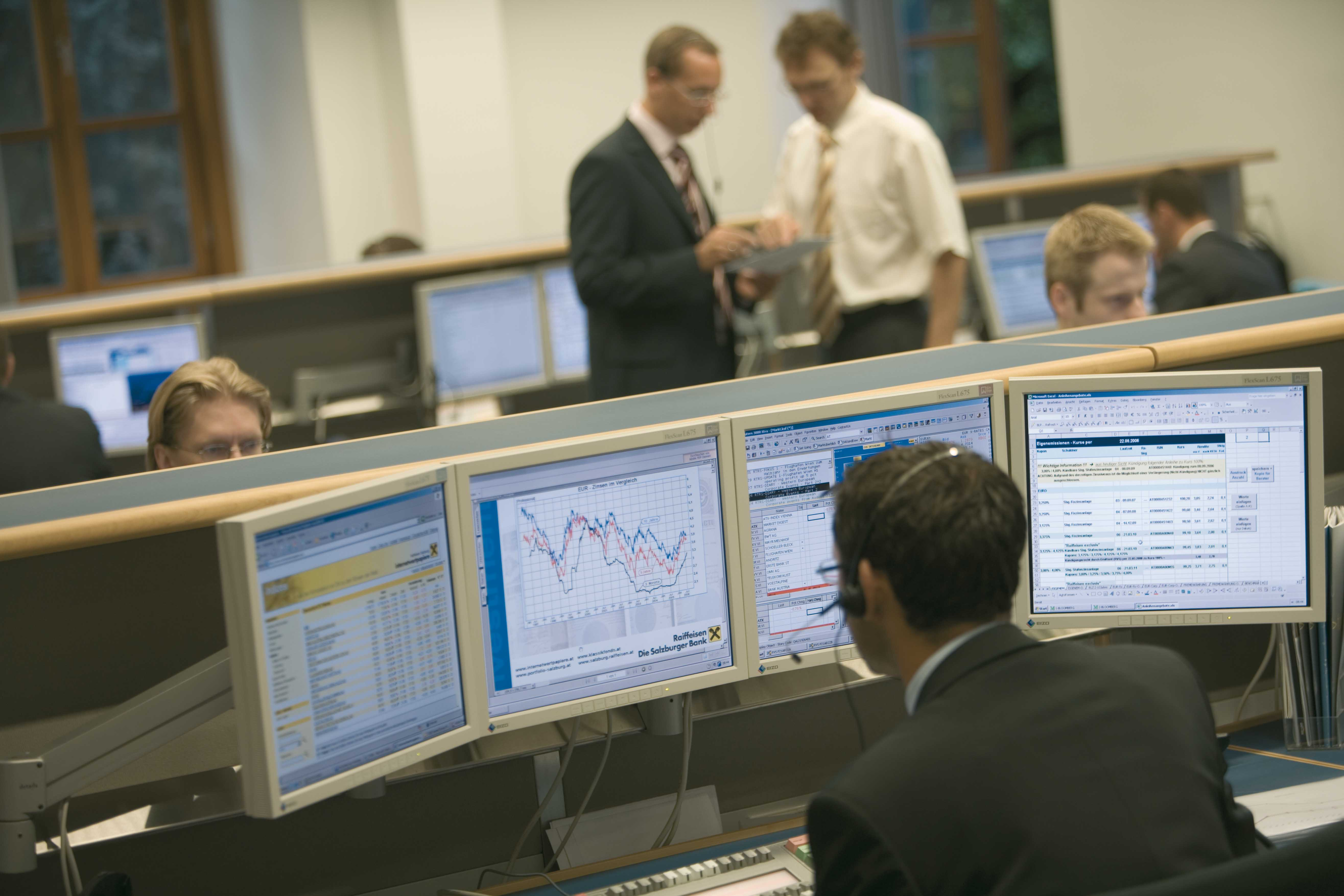 Handelsraum im Raiffeisenverband Salzburg